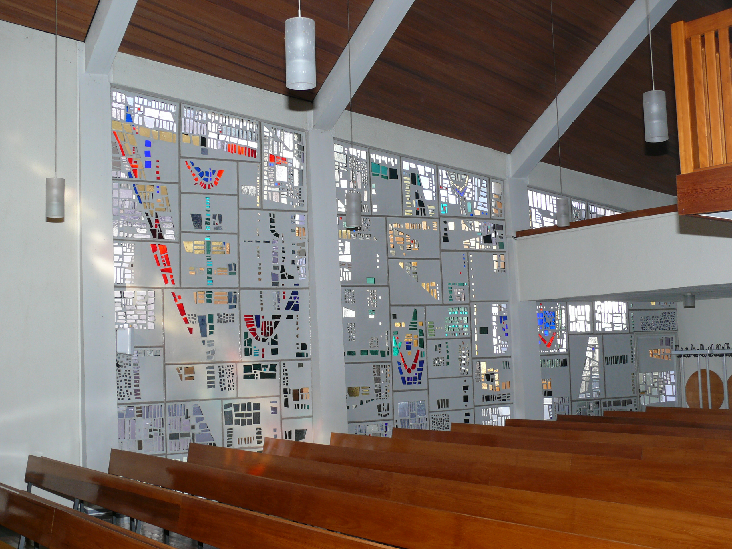 Ehringshausen-Katzenfurt, evangelische Kirche, Glasbetonfenster